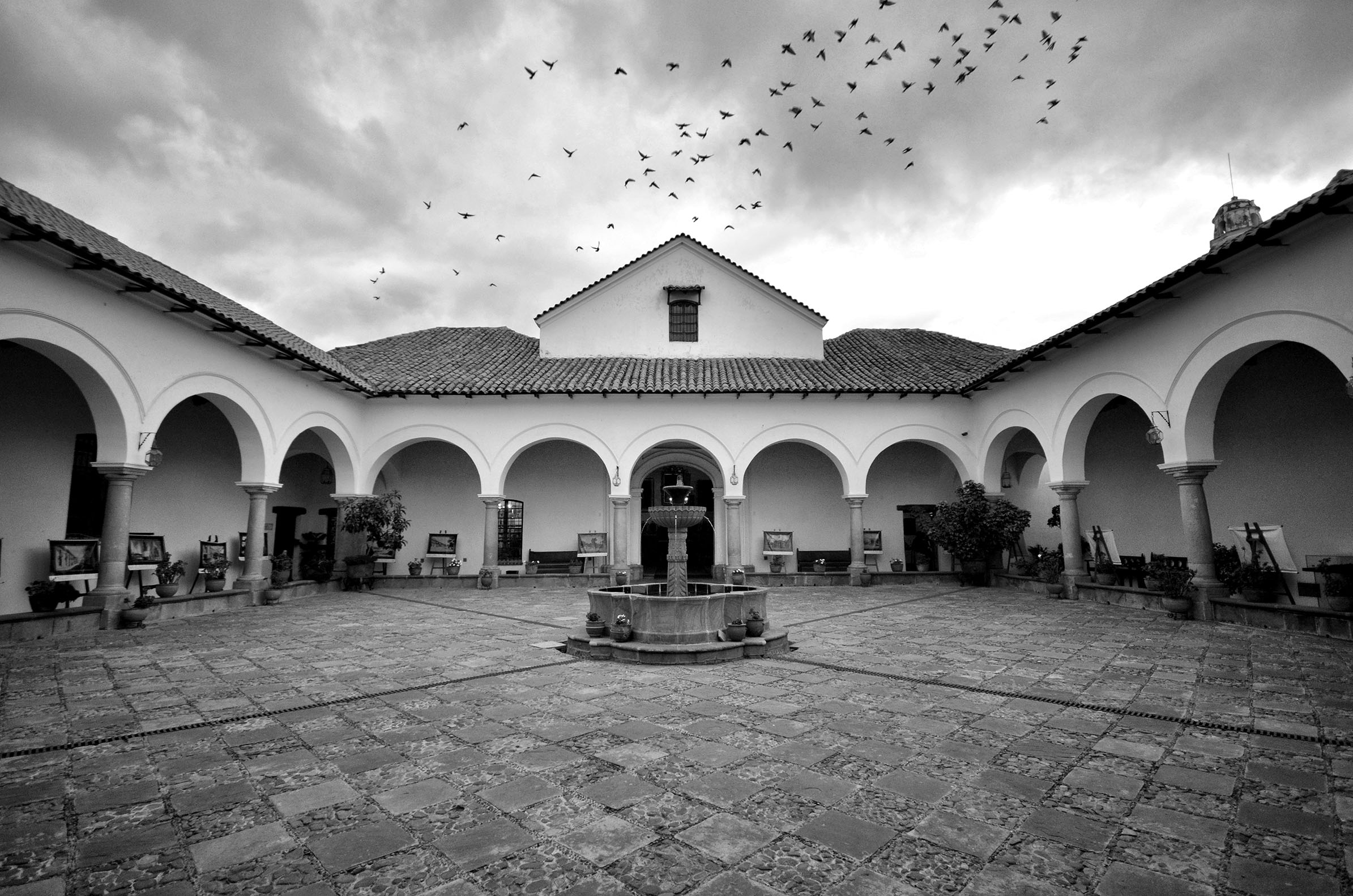 Casa de la Libertad This medium shows the protected monument with the number H/00-019 in Bolivia.